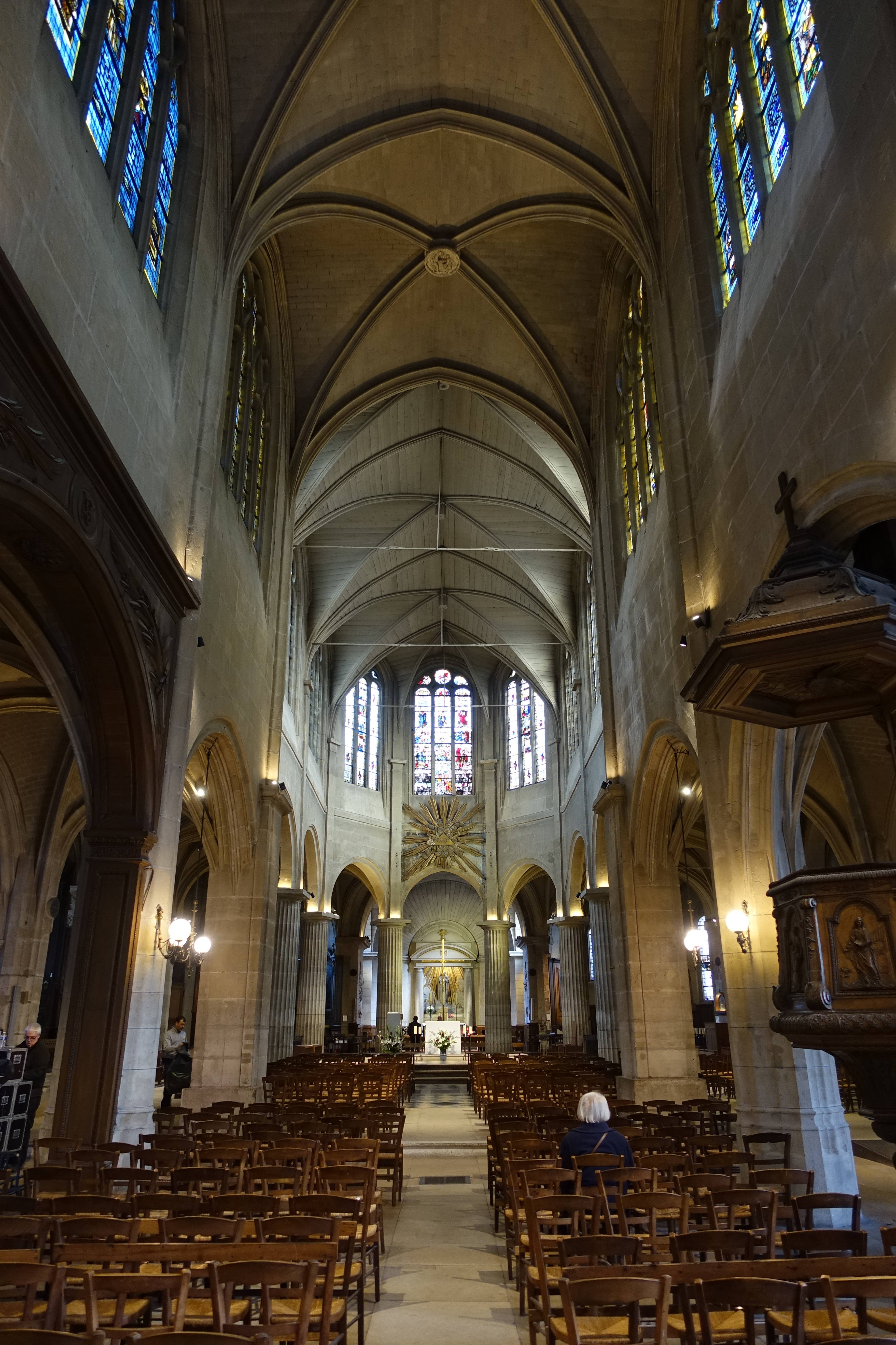 Eglise Saint-Médard @ Paris Église Saint-Médard, church at the 39-41 Rue Daubenton, 75005 Paris, France.